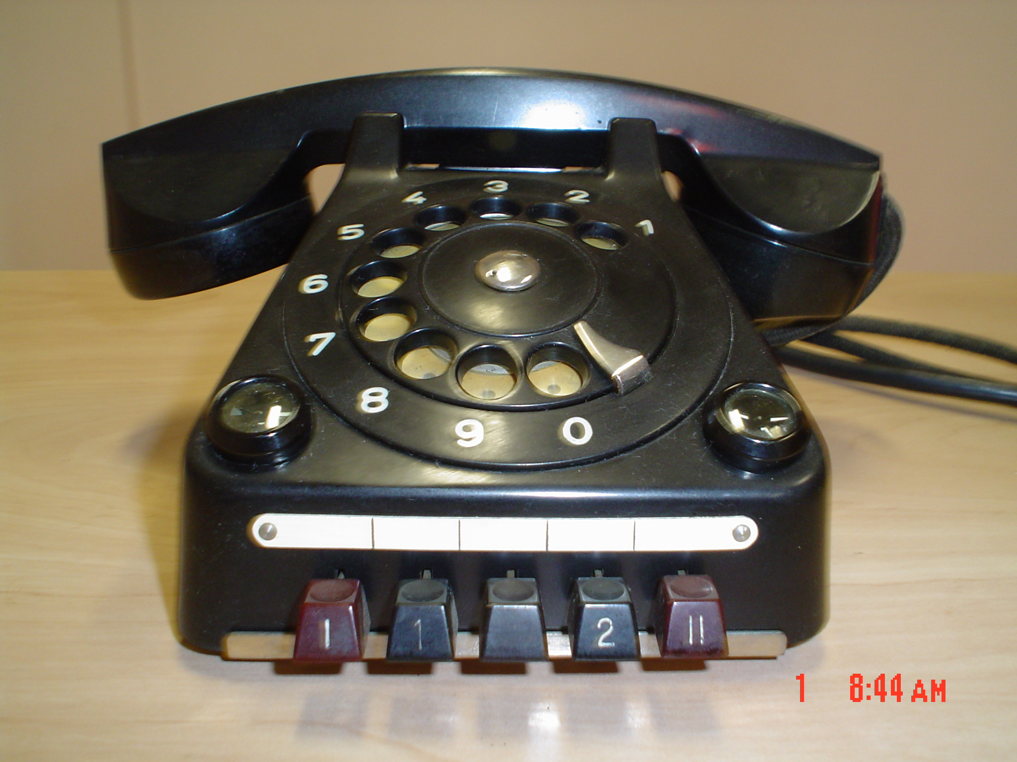 Memserva etcentralo.